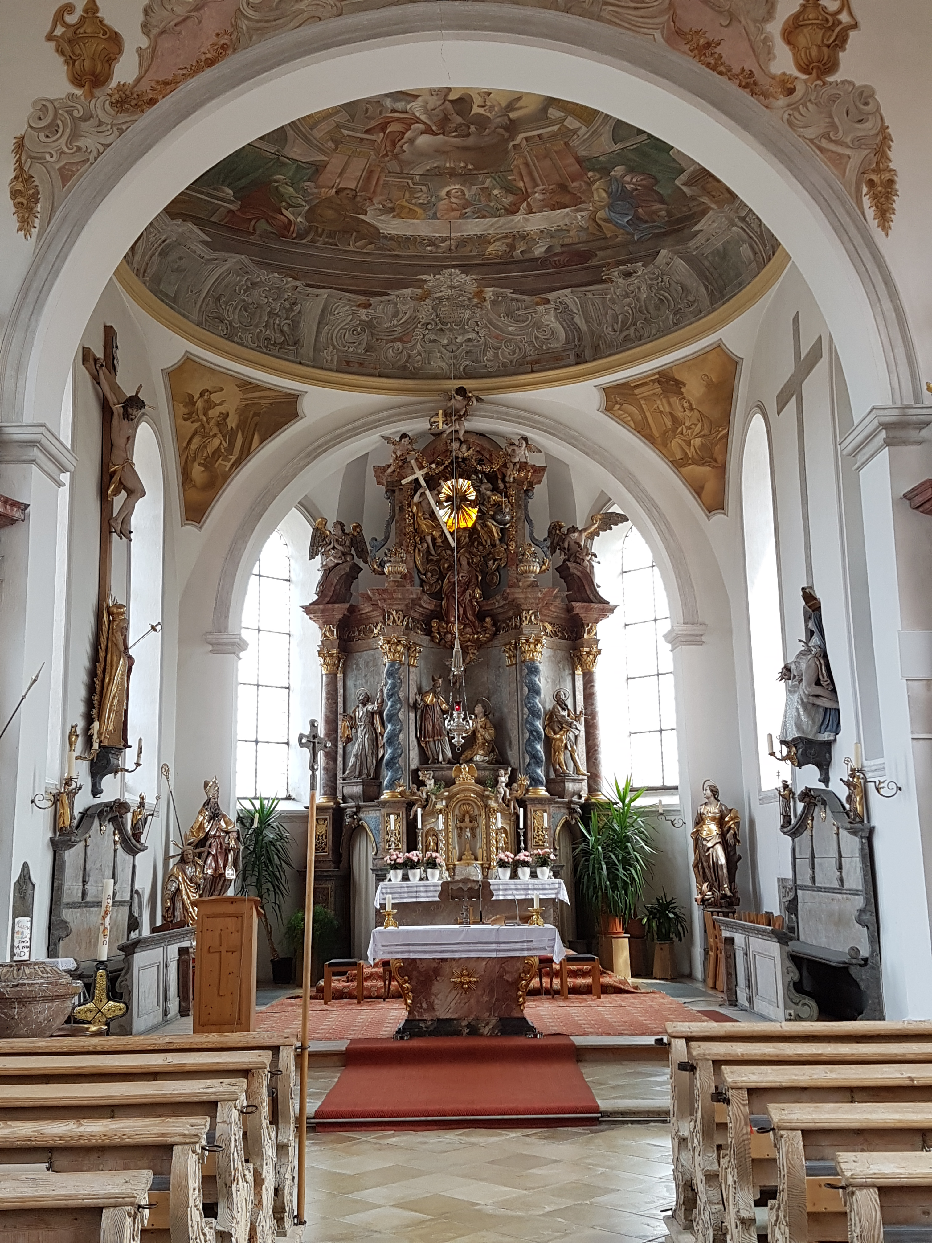 Burggen, Pfarrkirche St. Stephan